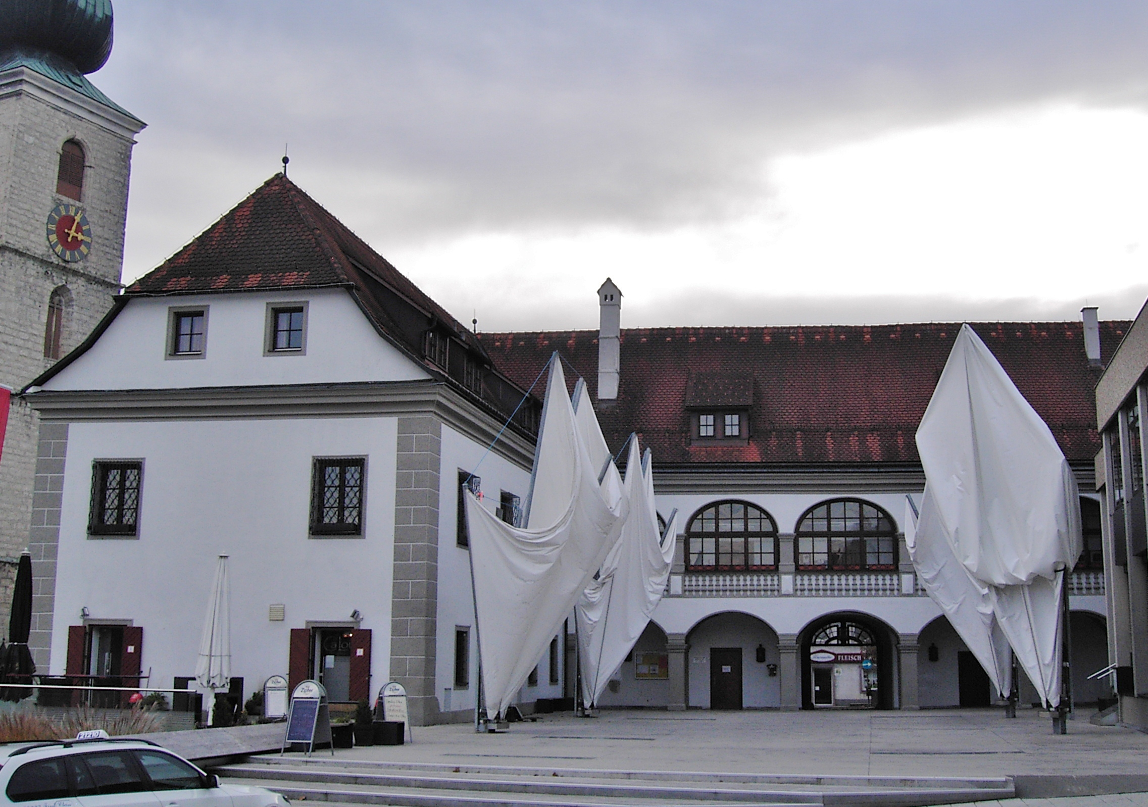 Sierning Schloss Sierning Hochstraße 2, Hofansicht